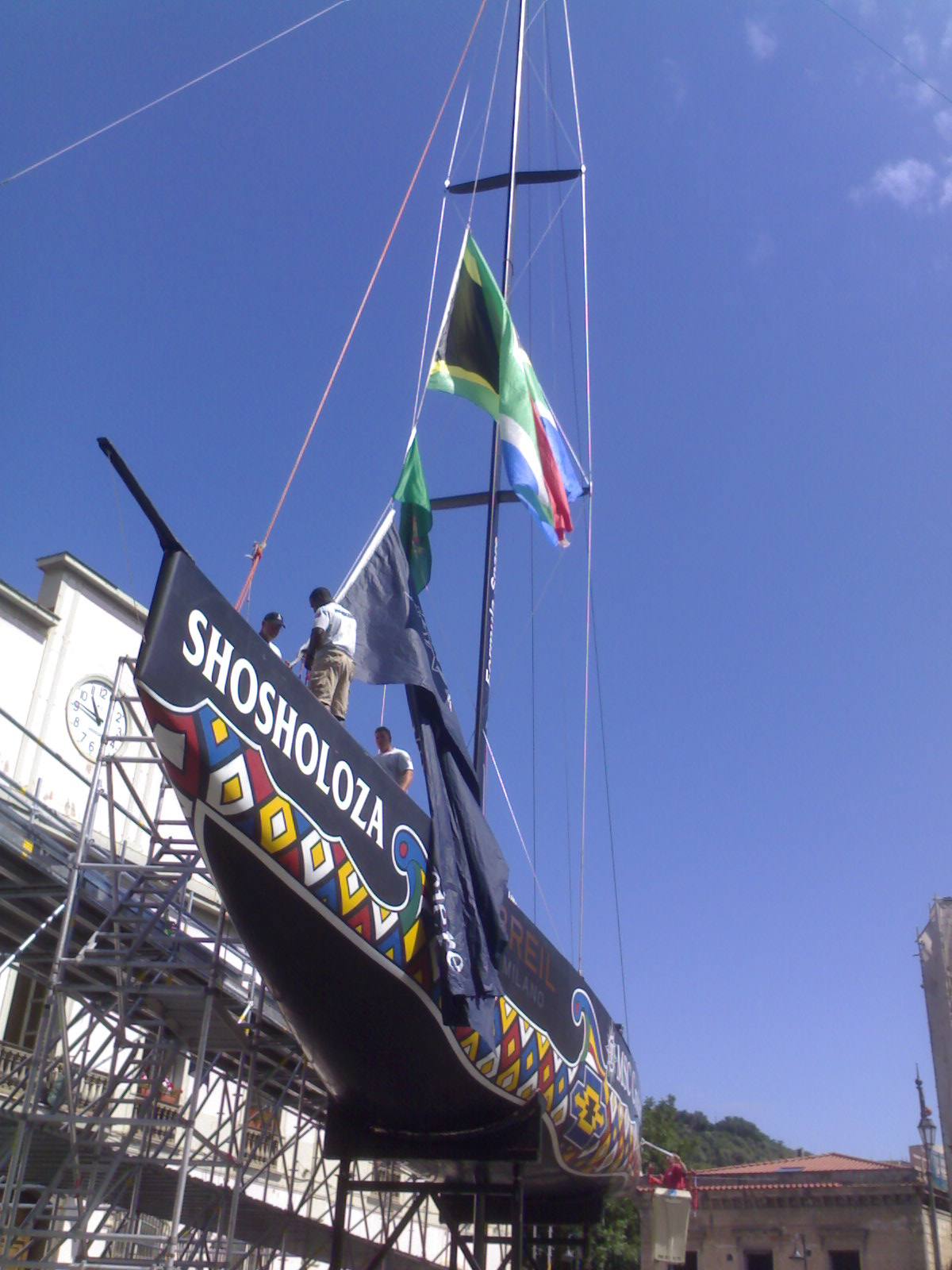 Shosholoza esposta a Nocera Inferiore